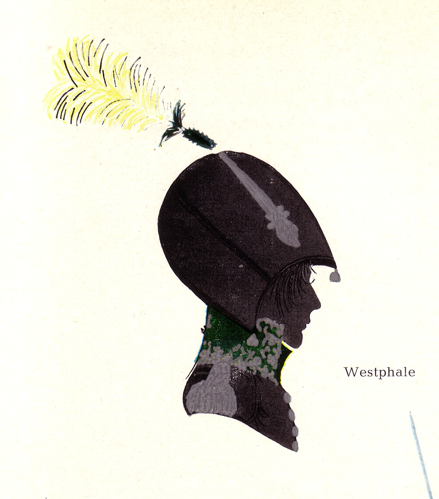 Silhouette des Hallenser Westfalen Friedrich Consbruch in Burschenwichs, 1806